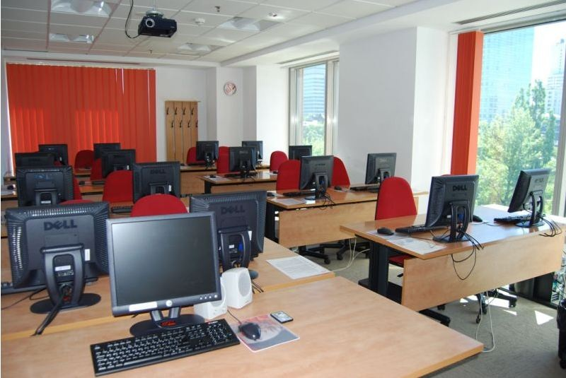 Sala szkoleniowa siedziby Altkom Akademii S.A. w Warszawie.